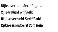 "De Rijksoverheid Serif is een broodtekstletter. De letter oogt zakelijk en elegant. De letter leest prettig en is zuinig in gebruik. De Rijksoverheid Serif is uitermate geschikt voor langere teksten en minder geschikt voor koppen."